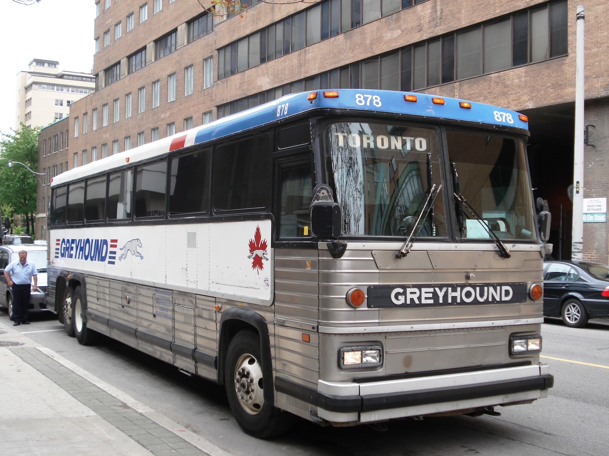 ônibus da Greyhound Lines in Toronto, Canadá. Foto tirada em maio de 2006.